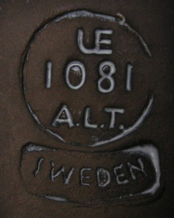 Anna-Lisa Thomson "Paprika", stämpel 1948